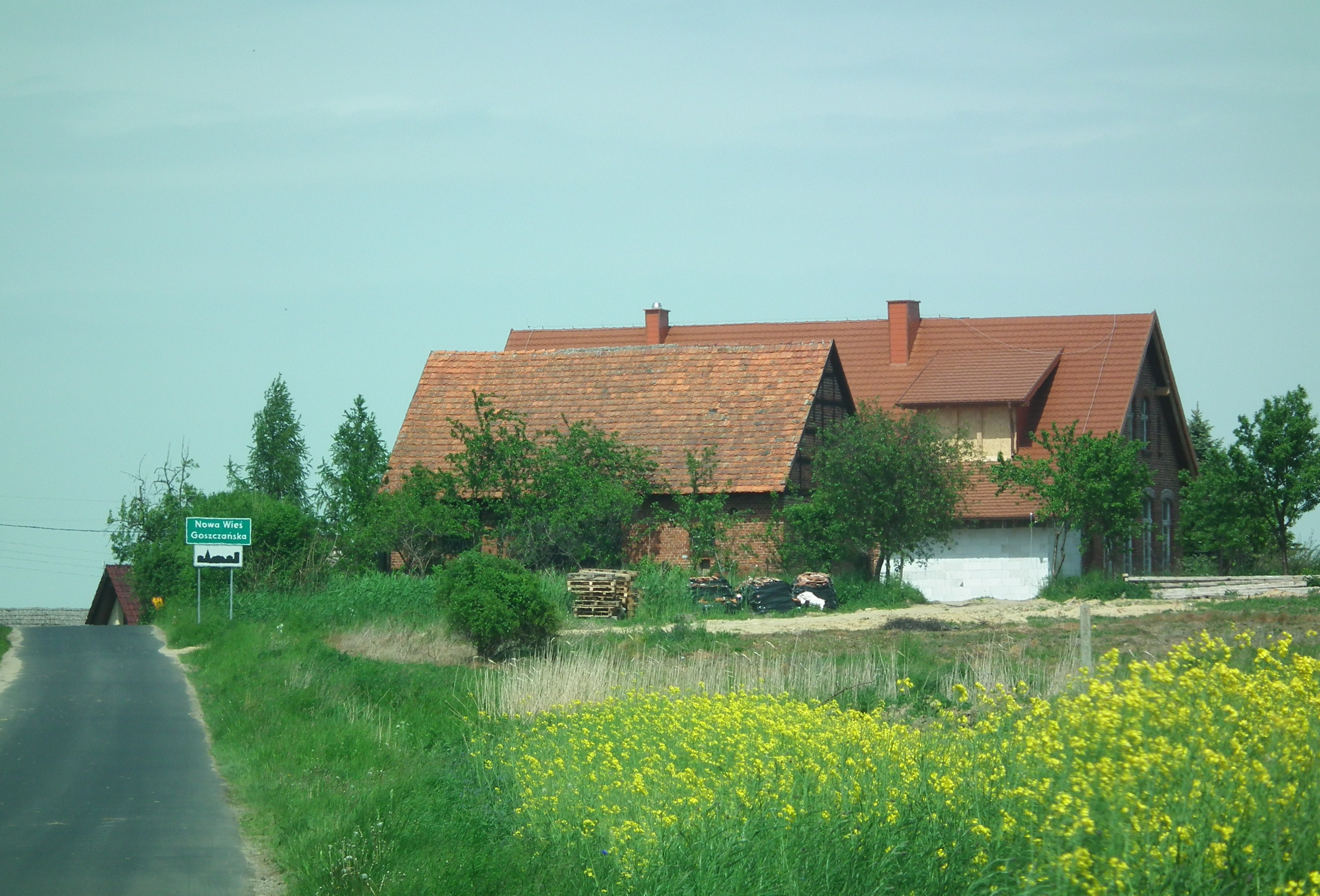 Nowa Wieś Goszczańska od południa.